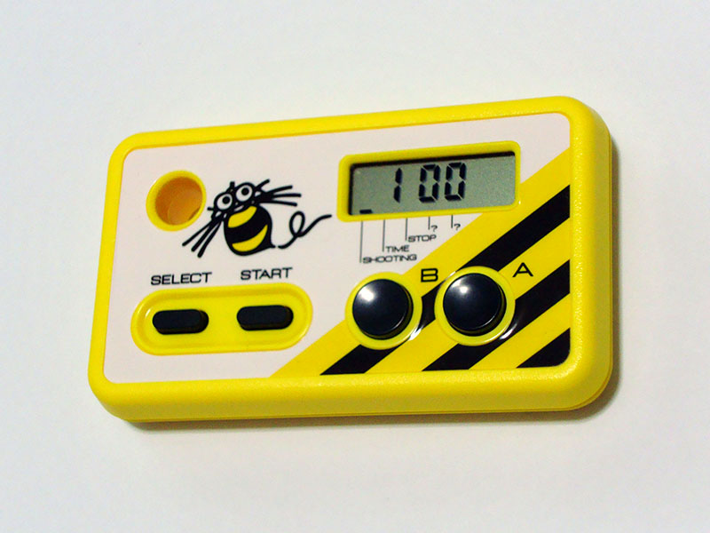 シュウォッチ初期型（2008年復刻版）